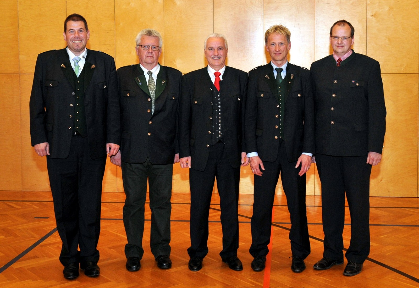 Gemeindevorstand der Marktgemeinde Sankt Lorenzen im Mürztal nach der Gemeinderatswahl 2015. Das Bild zeigt von links nach rechts Gemeindekassier Georg Steiner, 1. Vizebürgermeister Richard Thomüller, Bürgermeister Alois Doppelhofer, 2. Vizebürgermeister Josef Tonweber und Gemeindevorstandsmitglied Dieter Schiroky.